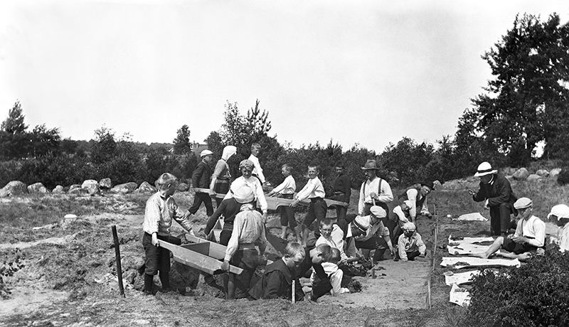 RAÄ-nummer Mjällby 61:1. Grävningsfält A vid undersökning av stenåldersboplats i Siretorp, utförd 1912 av Knut Kjellmark. Motiv: Mjällby 61:1 Kategori: Arkeologisk undersökning, Boplats RAÄ-nummer Mjällby 61:1. Grävningsfält A vid undersökning av stenåldersboplats i Siretorp, utförd 1912 av Knut Kjellmark.